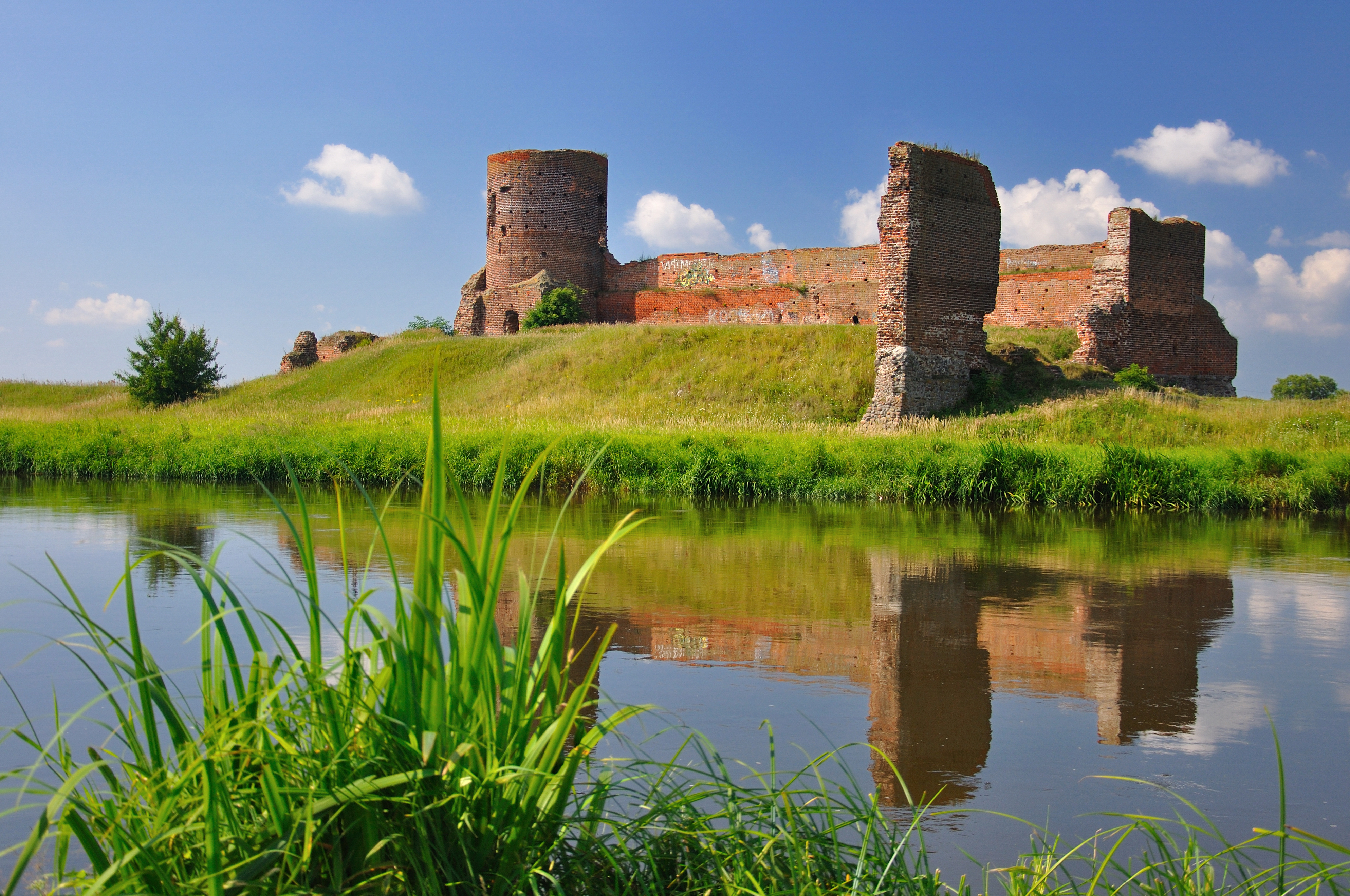 Koło - ruiny zamku z XIV w. (zabytek nr 30/380)